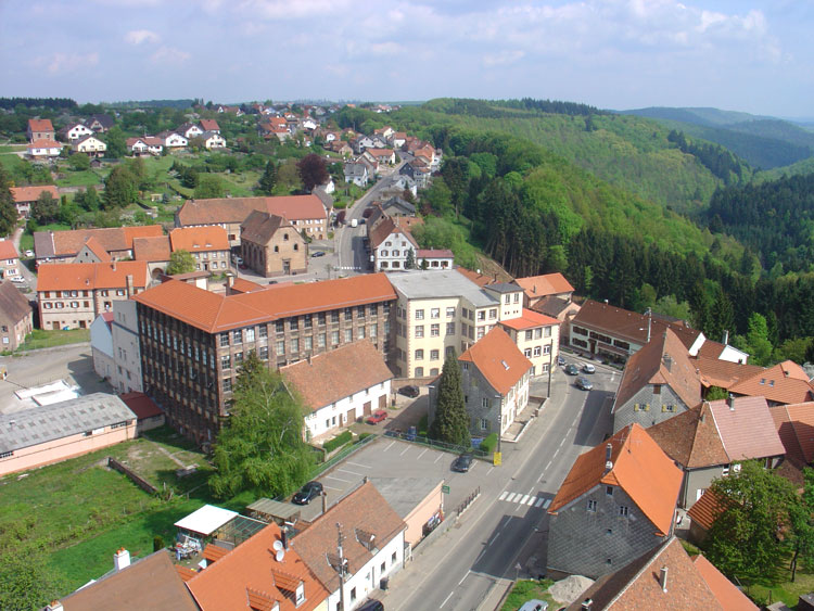 vue sur une partie de la commune de goetzenbruck depuis le clocher.